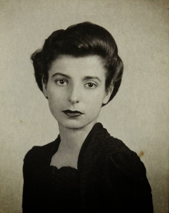 María Cristina Vilanova de Arbenz (oficial)